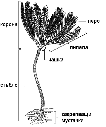 Анатомия на морска лилия